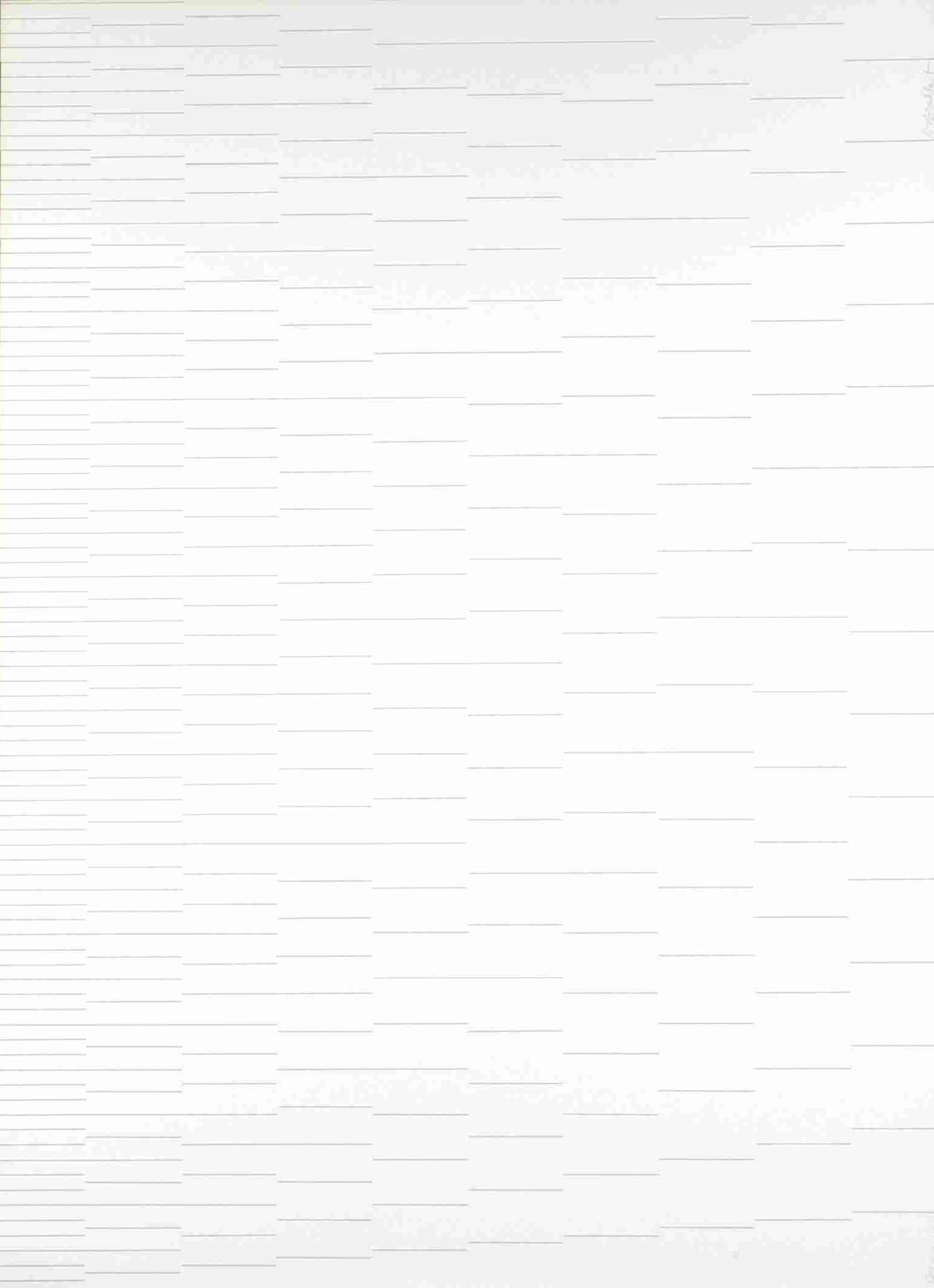 Zeefdruk. Nr. 98/100. Hoort bij map Symposion Gorinchem, met vrm 00143 t/m 00158. Collectie Gelderland.